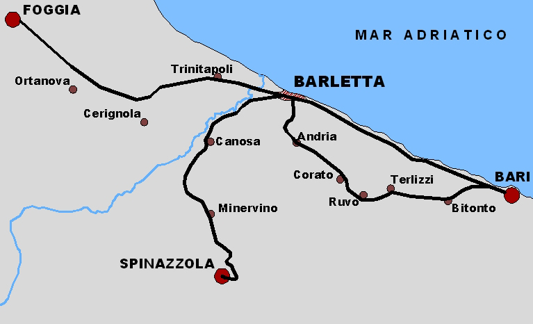 Barletta: Nodo ferroviario e principali capolinea delle reti ferroviarie collegate.